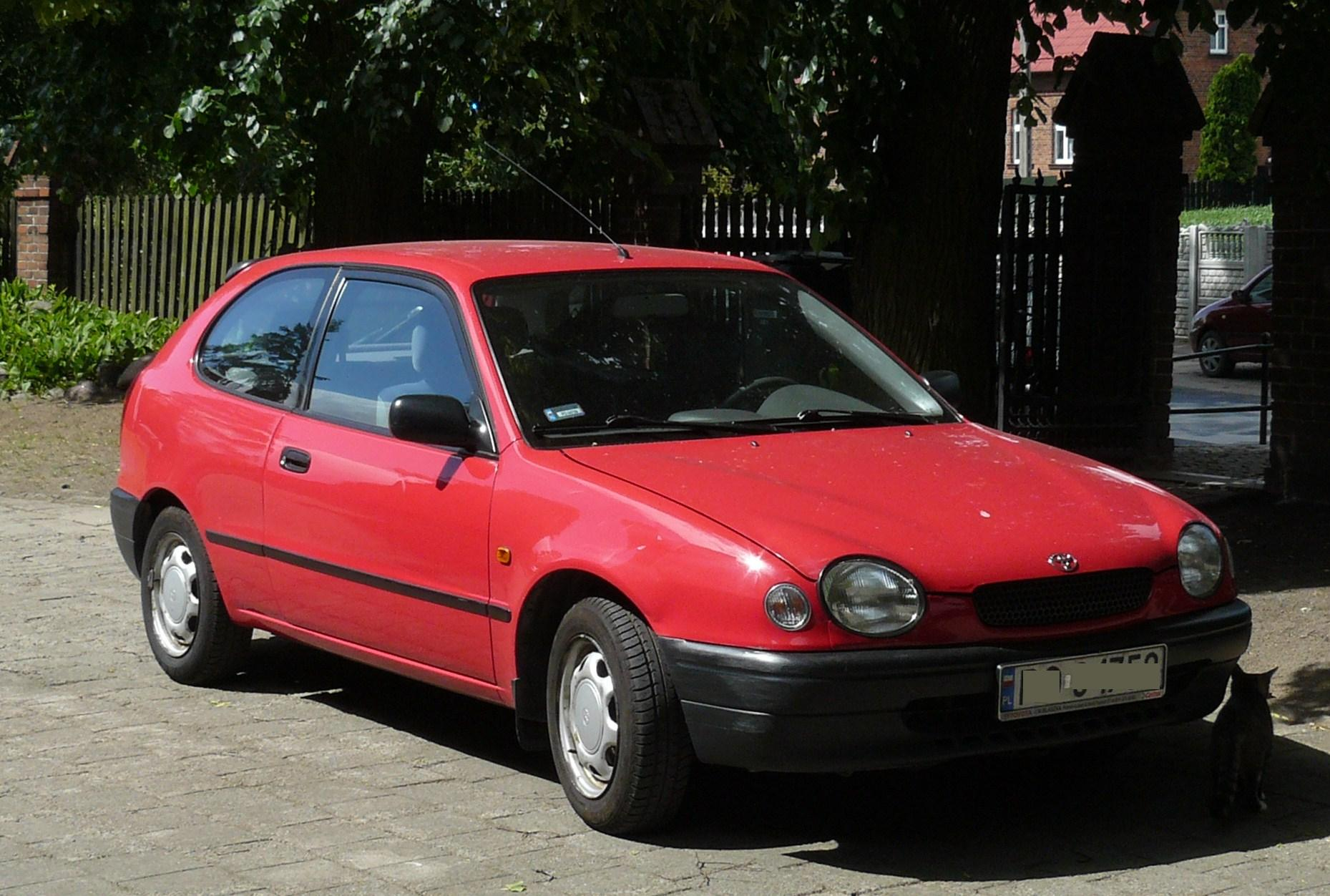 Toyota Corolla E110 na Głuszynie w Poznaniu.